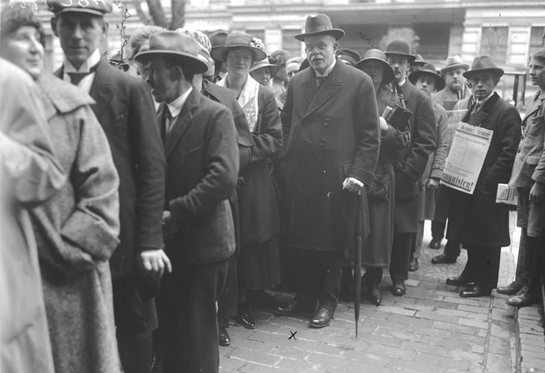 Zur Reichstagswahl am 4. Mai 1924. Der deutsche Reichskanzler Marx wählt. Reichskanzler (X) beim Anstehen vor seinem Wahllokal.